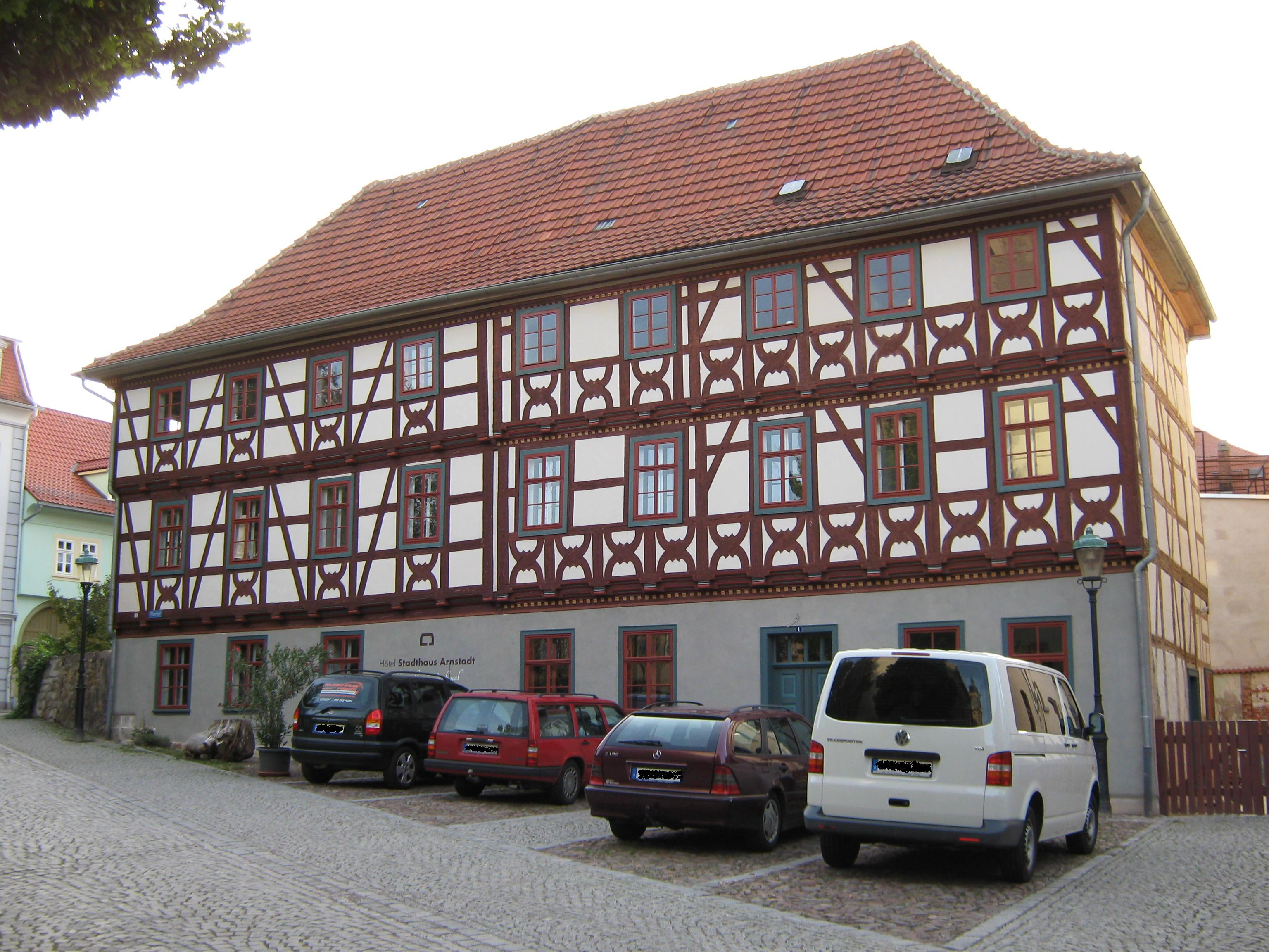 Das Stadthaus Arnstadt gegenüber der Oberkirche; Hotel und Veranstaltungshaus.